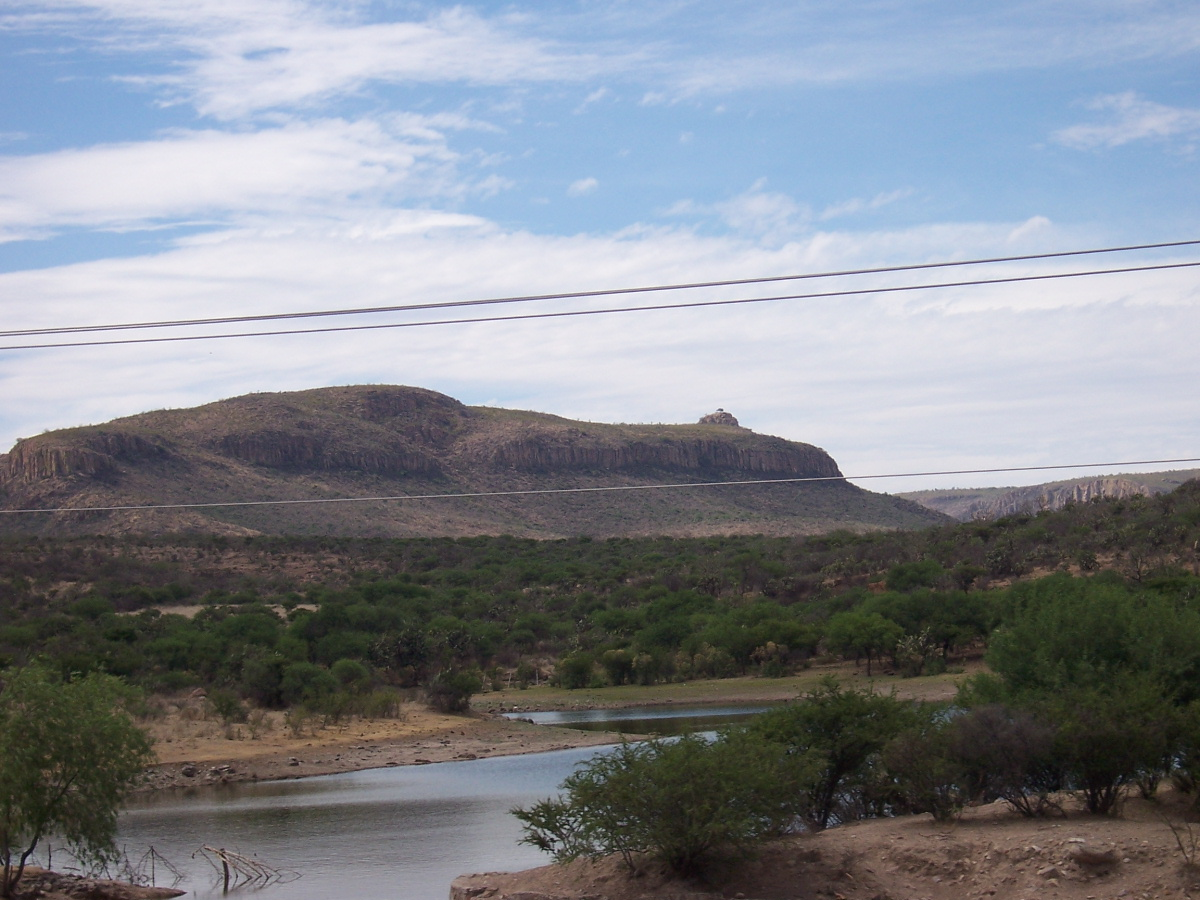 Carr. Pabellón de Arteaga - San José de Gracia